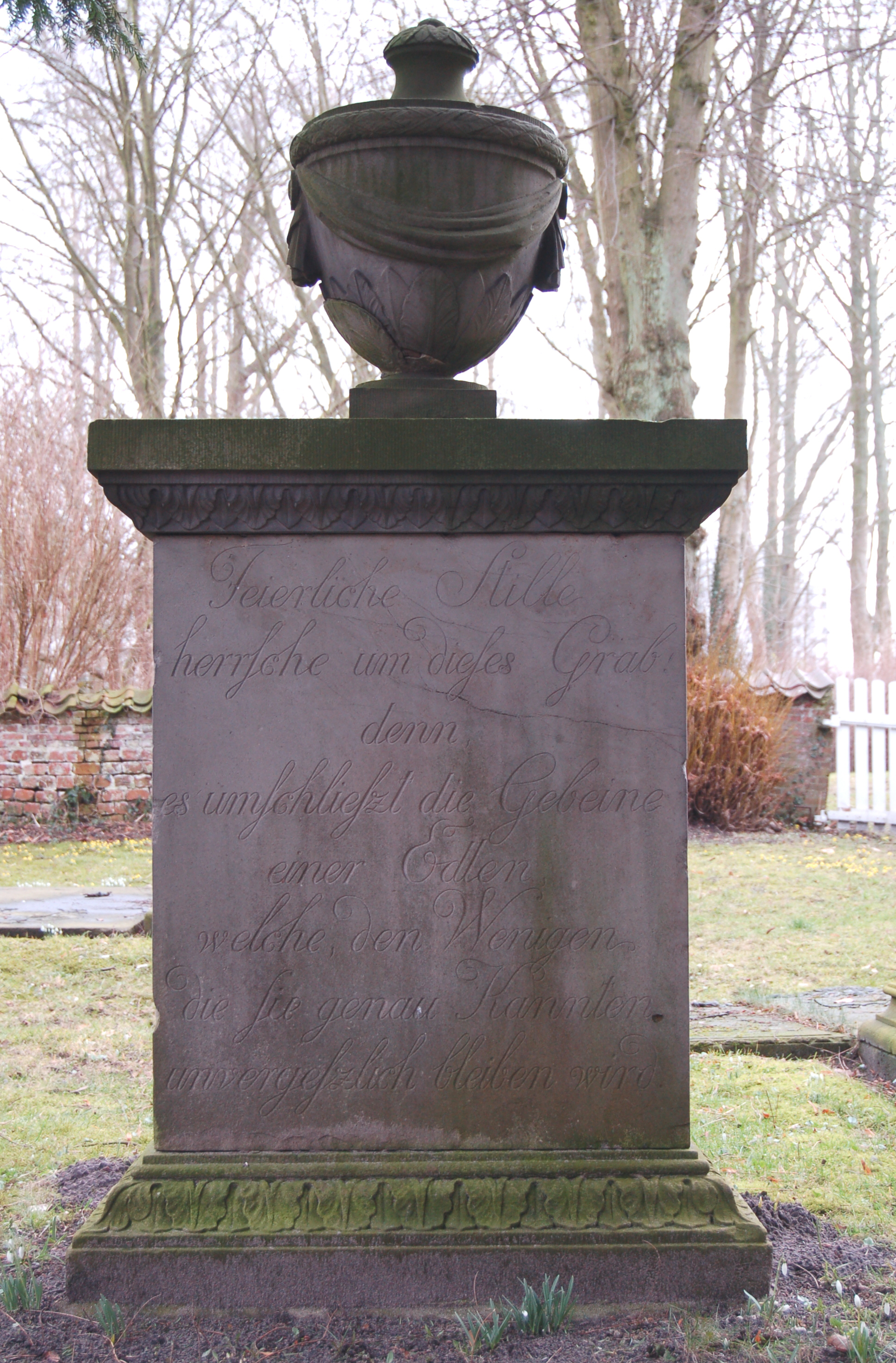 Grabstein von Metta von Oberg (1737-1794) auf dem Jungfernfriedhof in Uetersen (Rückseite).